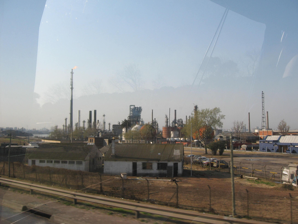 Industrial Area at Córdoba, Argentina